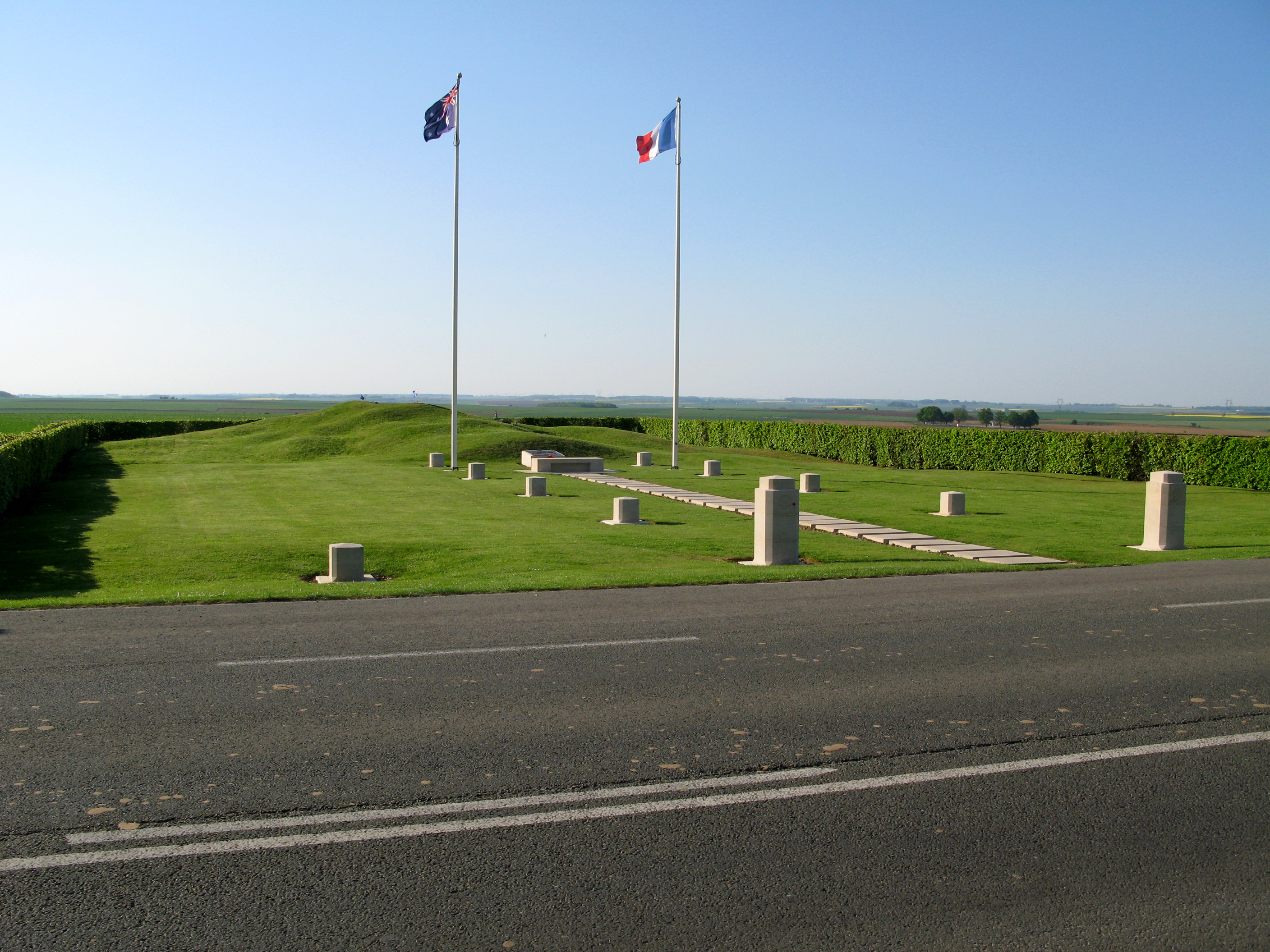 Pozières (Somme, France) Le site du Moulin à vent, qui fait face (de l'autre côté de la route) au Monument aux tanks est situé à la sortie du vilage, en direction de Bapaume. .